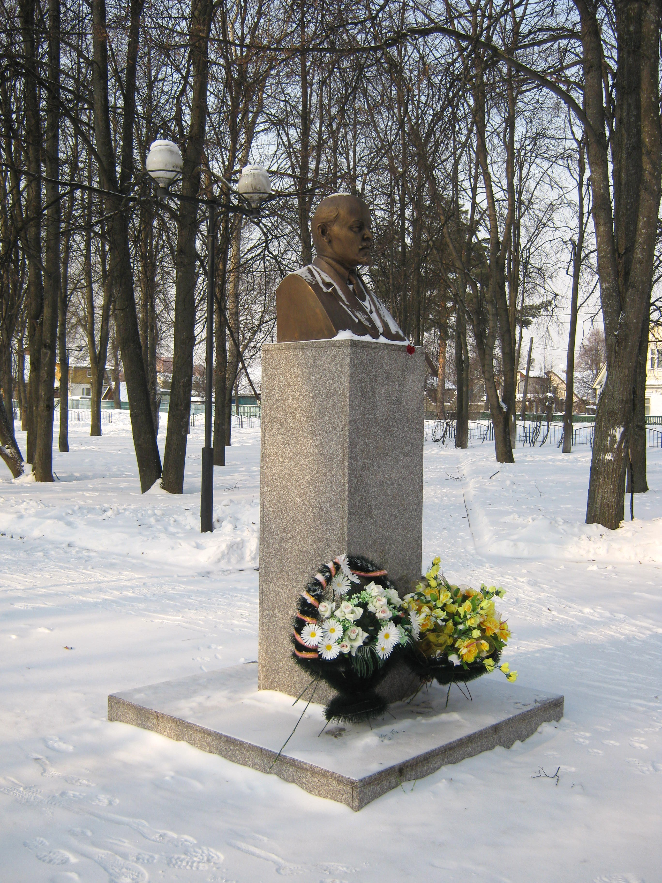 Памятник В.И.Ленину в детском парке Звенигорода